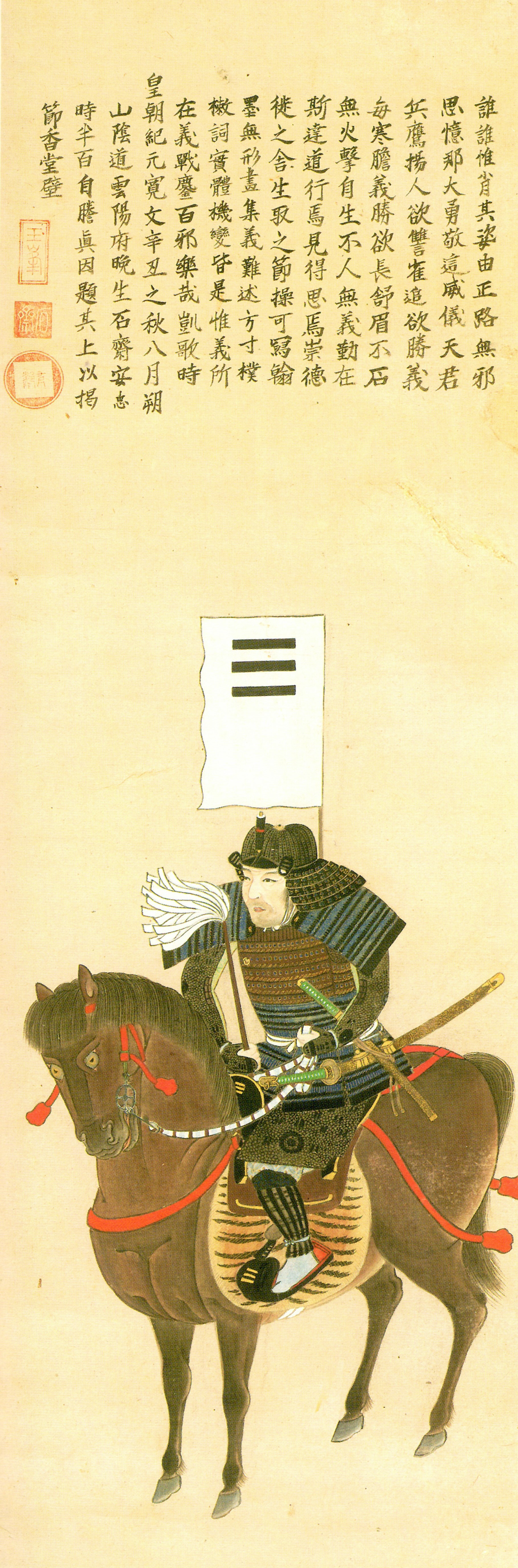 黒澤石斎の自画像。